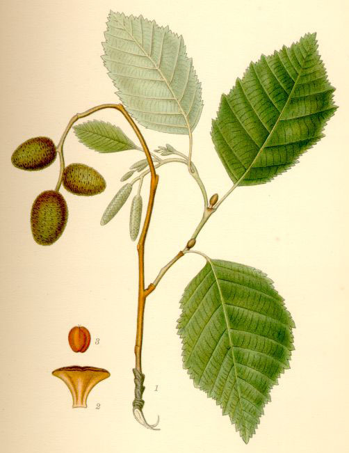 Gråal (Alnus incana)